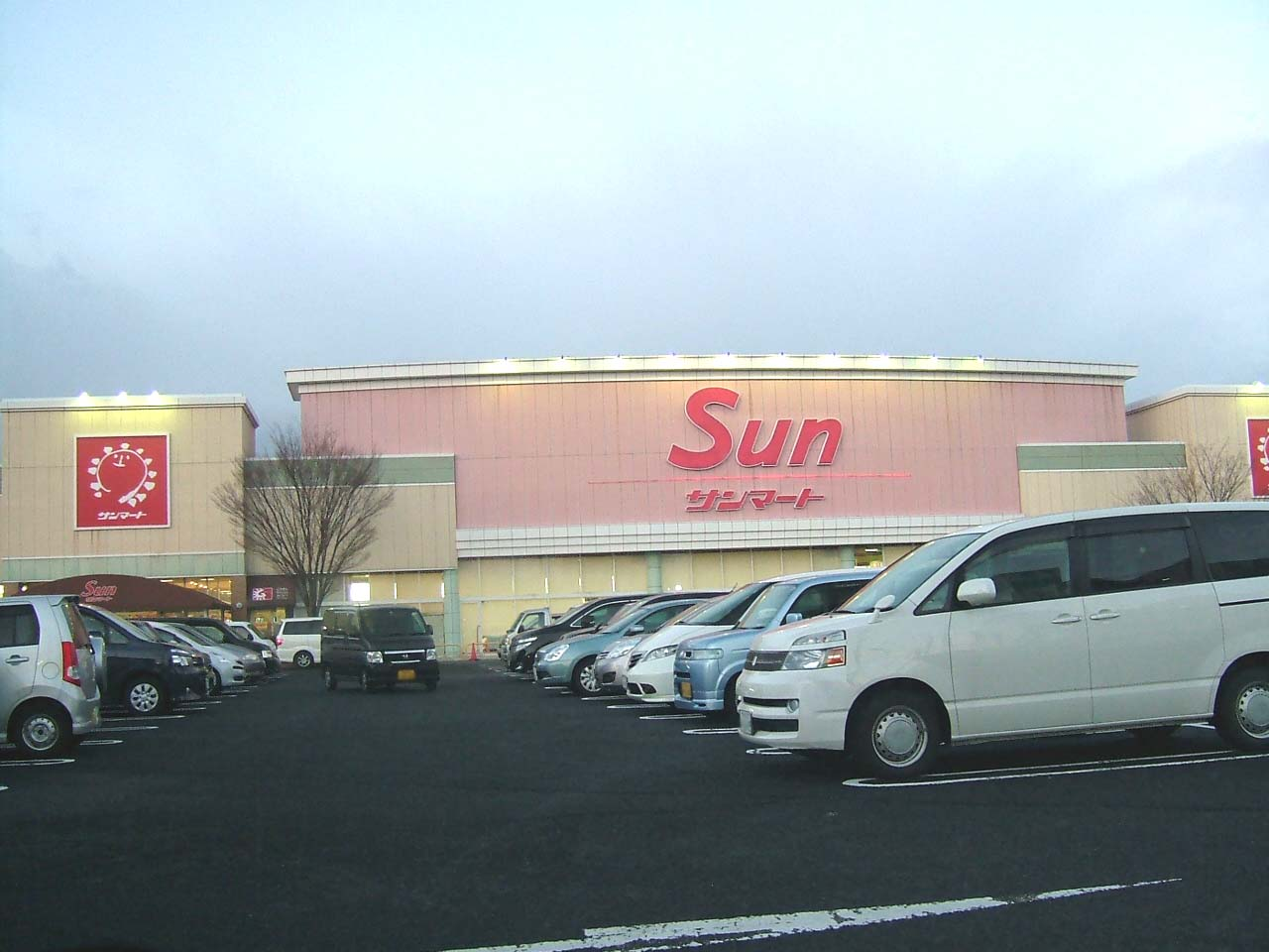 サンマート本店